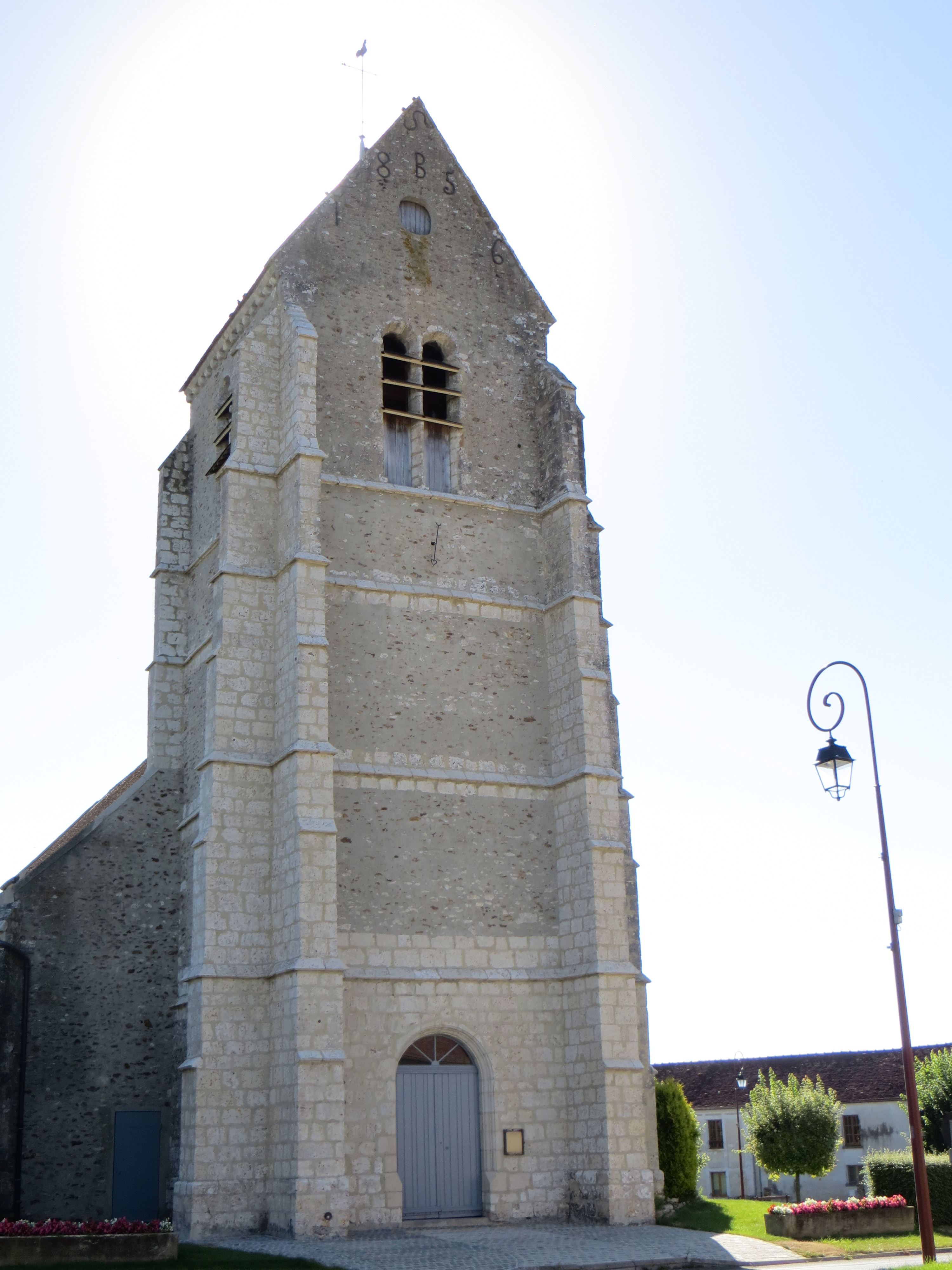 Vue du clocher